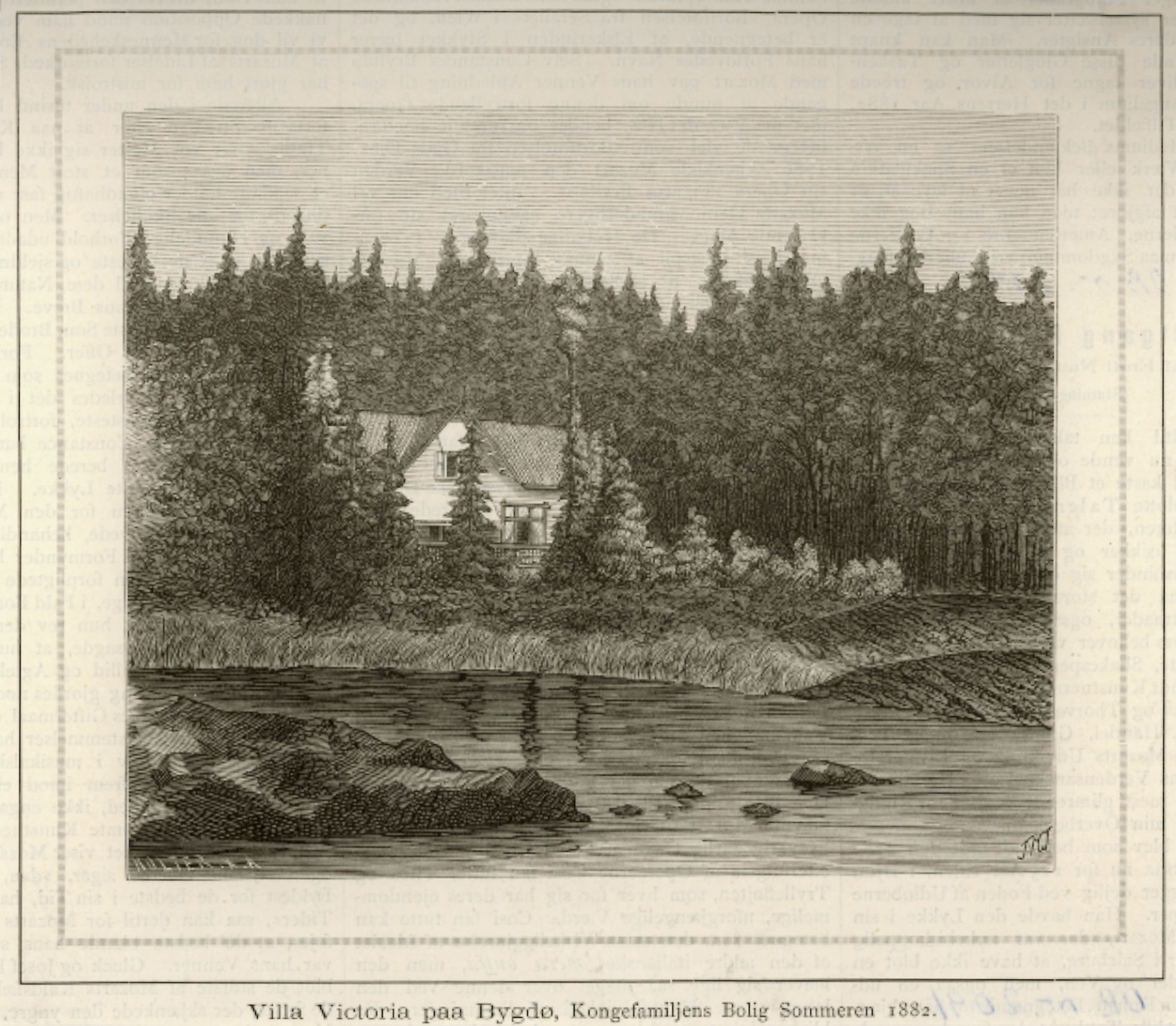 Villa Victoria på Bygdøy, kongelig residens tegnet av Hjalmar Welhaven. Revet på 1960-/1970-tallet.